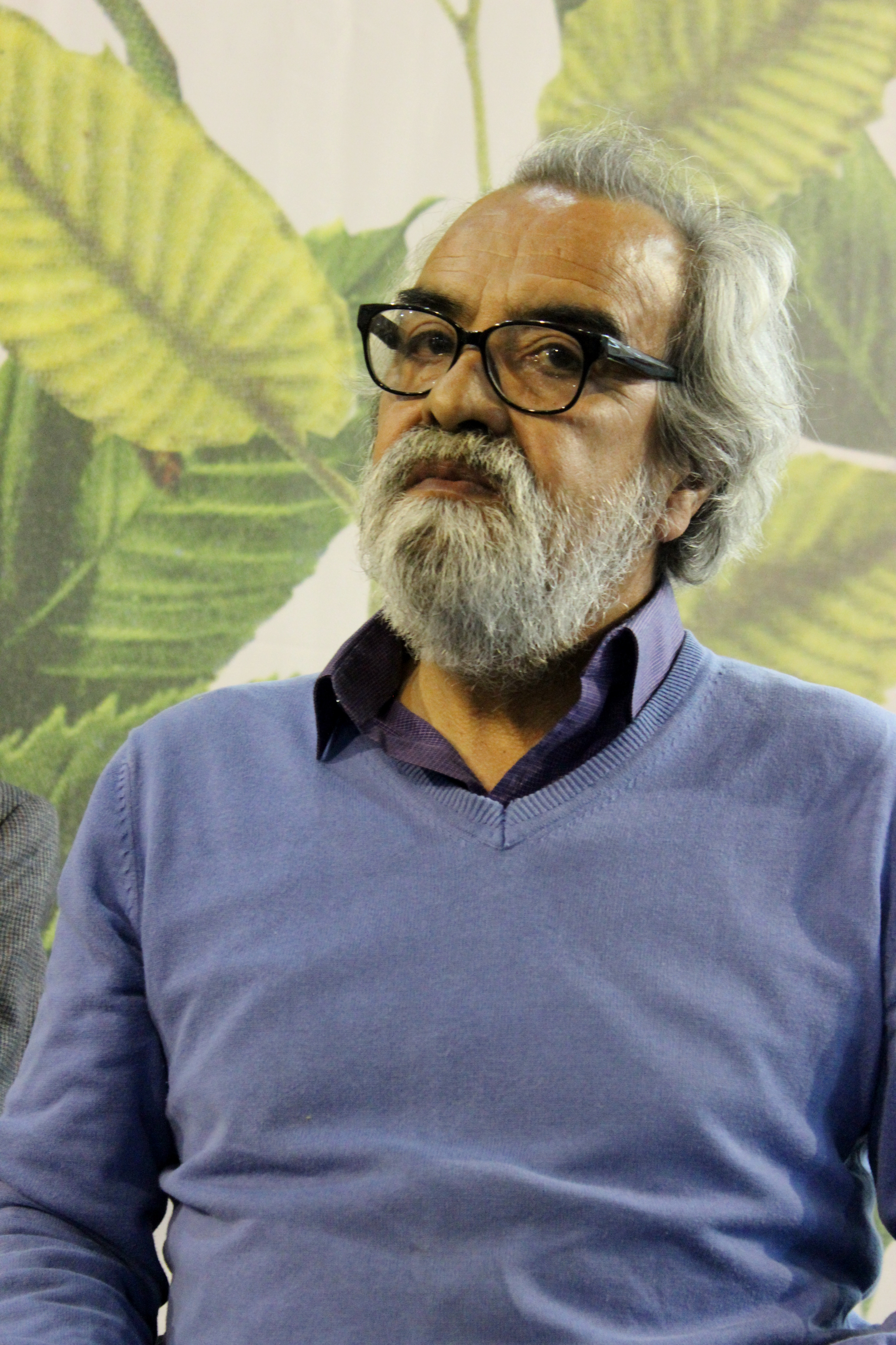 El poeta chileno Carlos Cociña durante la mesa El escritor y su implicancia en los movimientos sociales, realizada en la Feria Internacional del Libro de Santiago 2018 (Foro del Autor, 1 de noviembre).